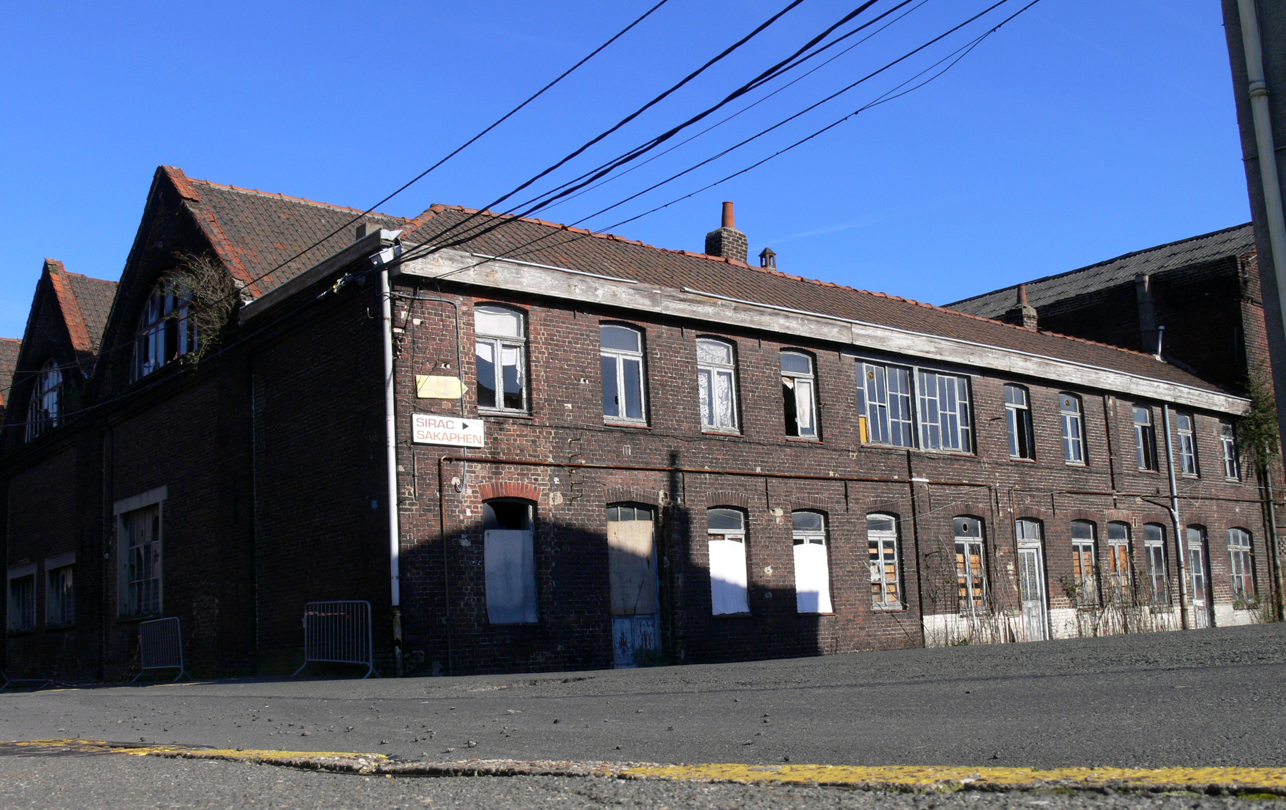 habitation (abandonnée) construite le long d'un groupe de hangards industriels à Saint-André, près de Lille, au bord de la Deûle canalisée, dans le Nord de la France).